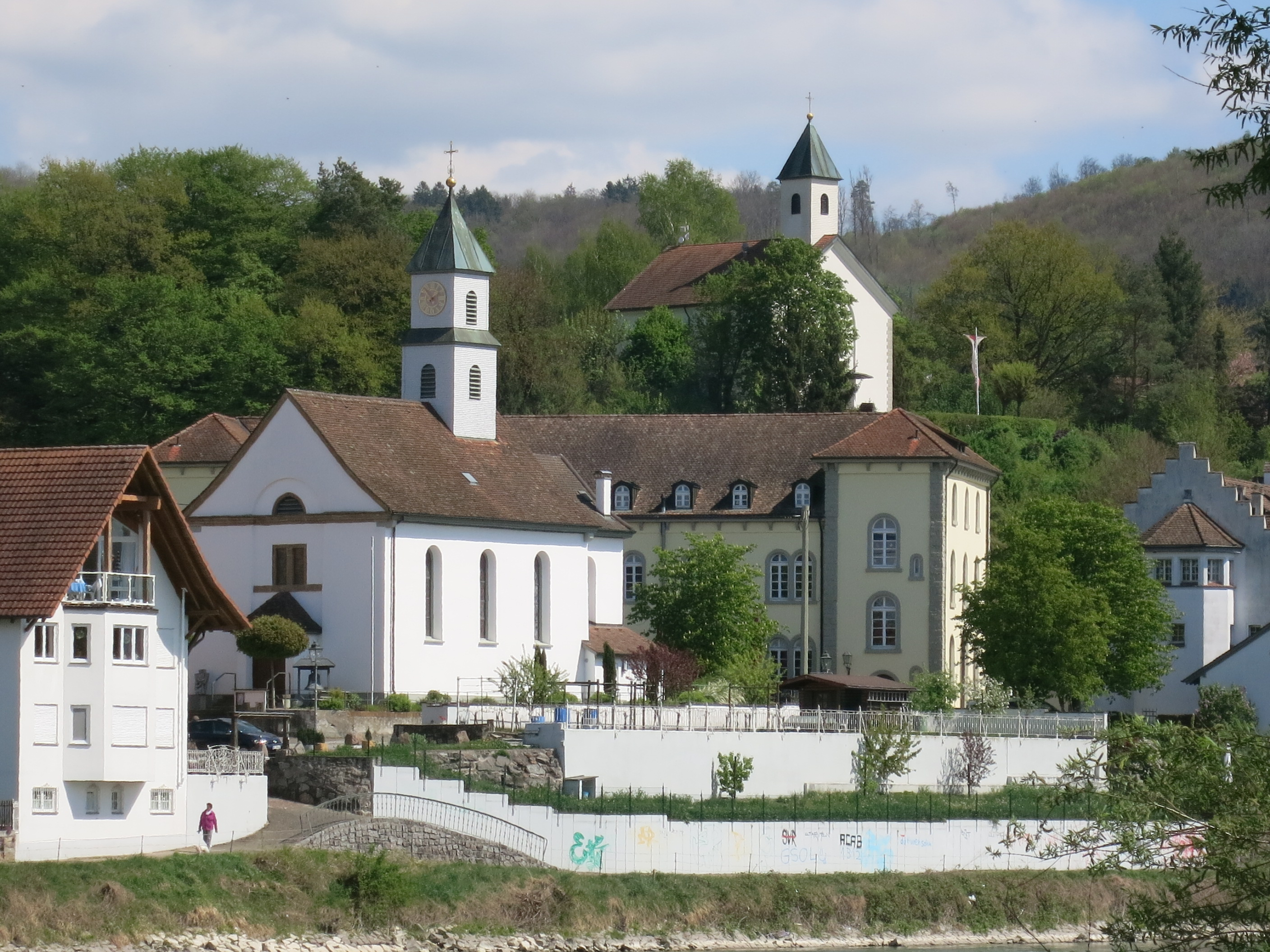 Kadelburg, Küssaberg, Deutschland